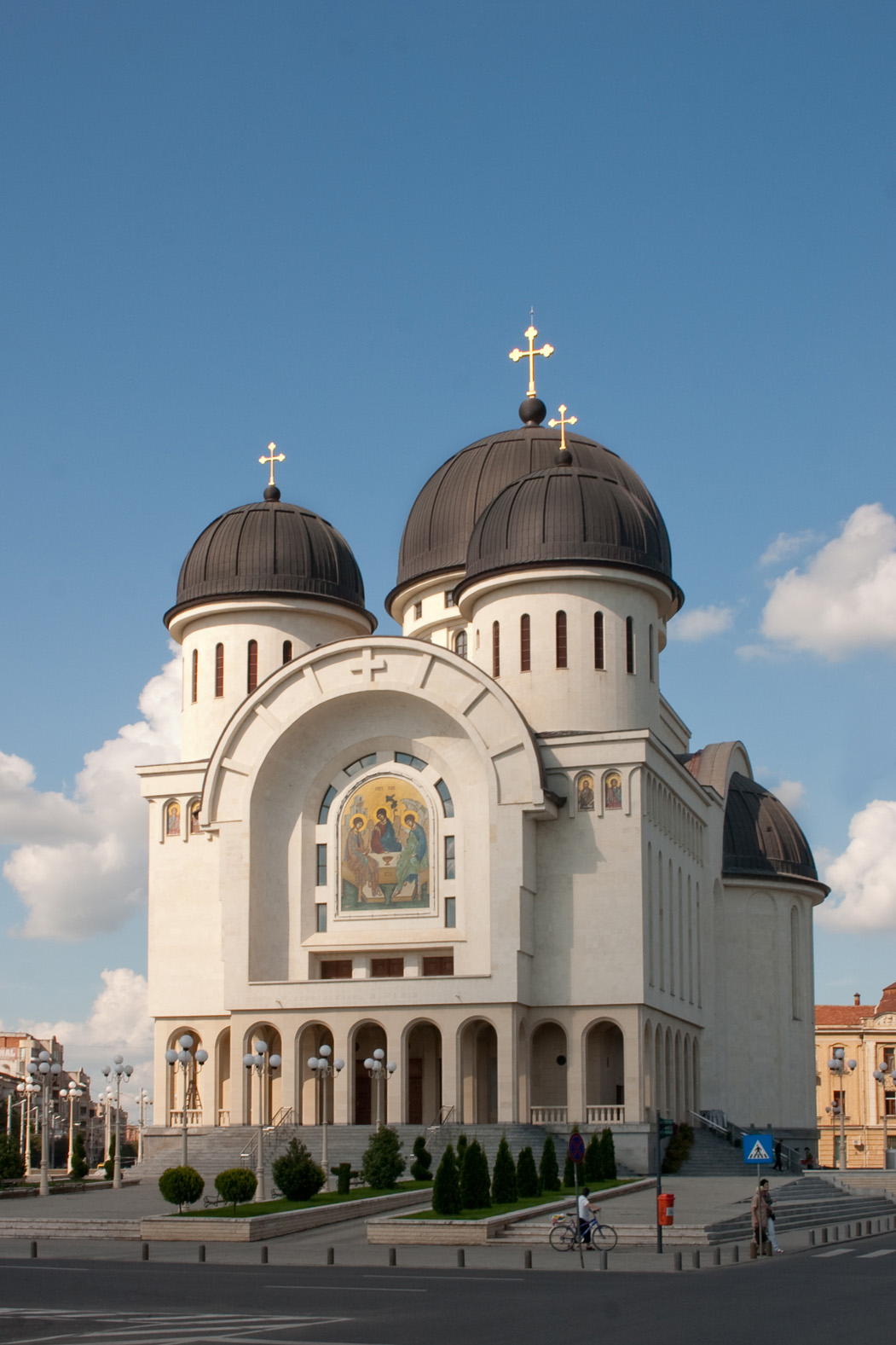 Orthodoxe Kathedrale in Arad, Rumänien